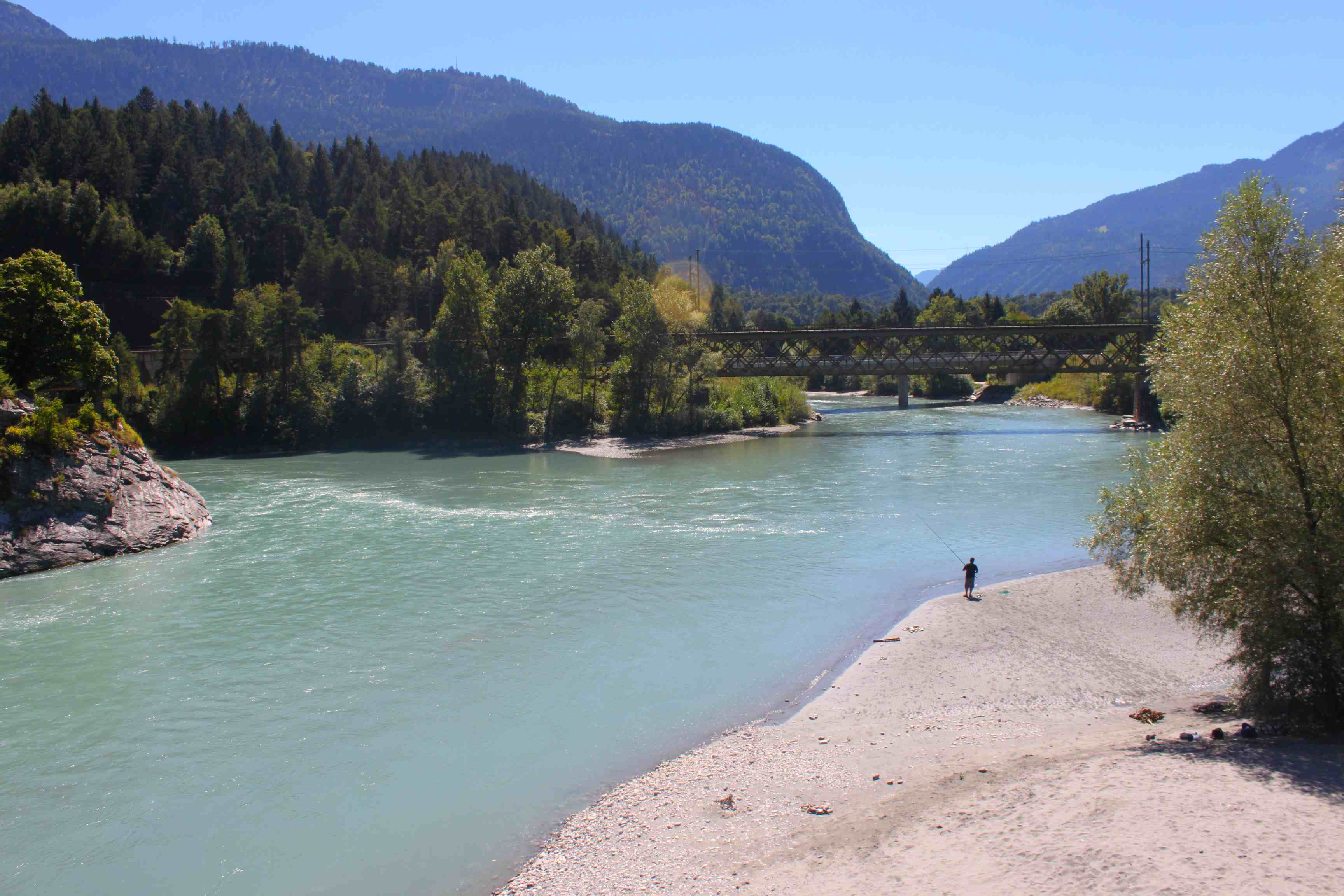 Bei Schloss Reichenau fließen Vorderrhein (links unten) und Hinterrhein (rechts) zusammen und strömen gemeinsam als Alpenrhein (mitte links) dem Bodensee entgegen.